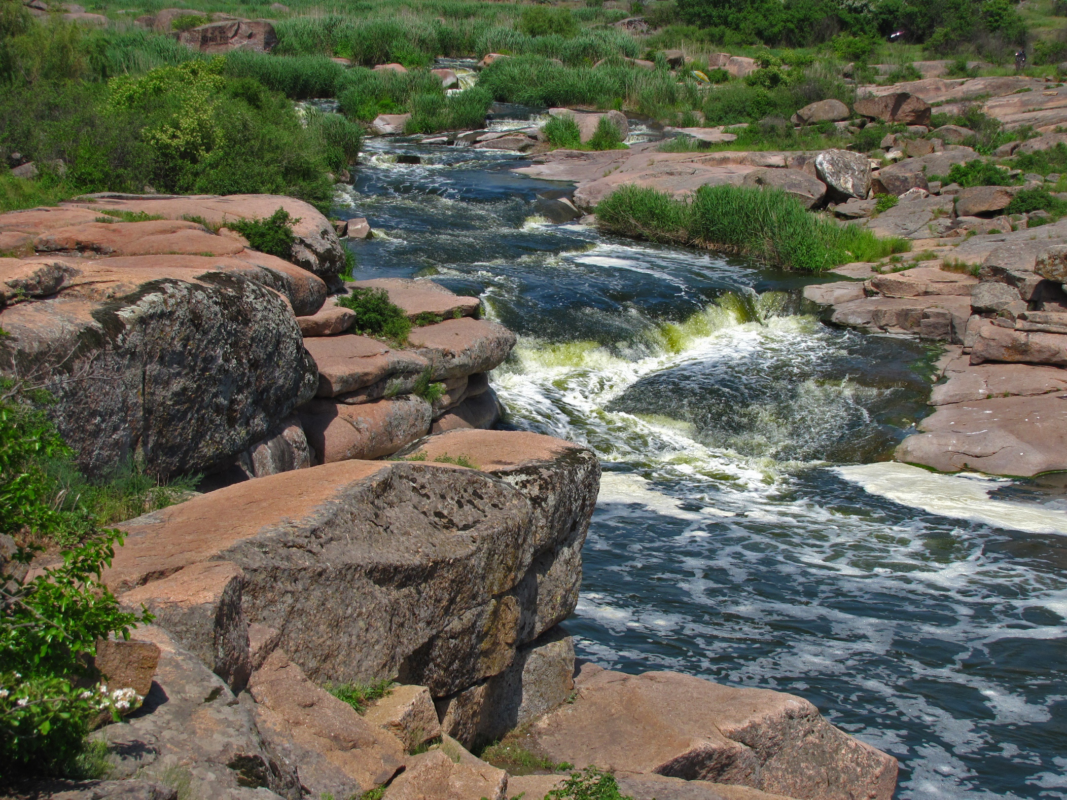 Водопад на р. Кам'янка, Апостолівський р-н, 2,5 км північно-східніше с. Червоний Тік